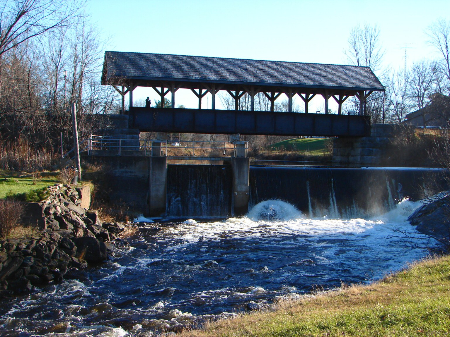 Killaloe, Ontario, Canada